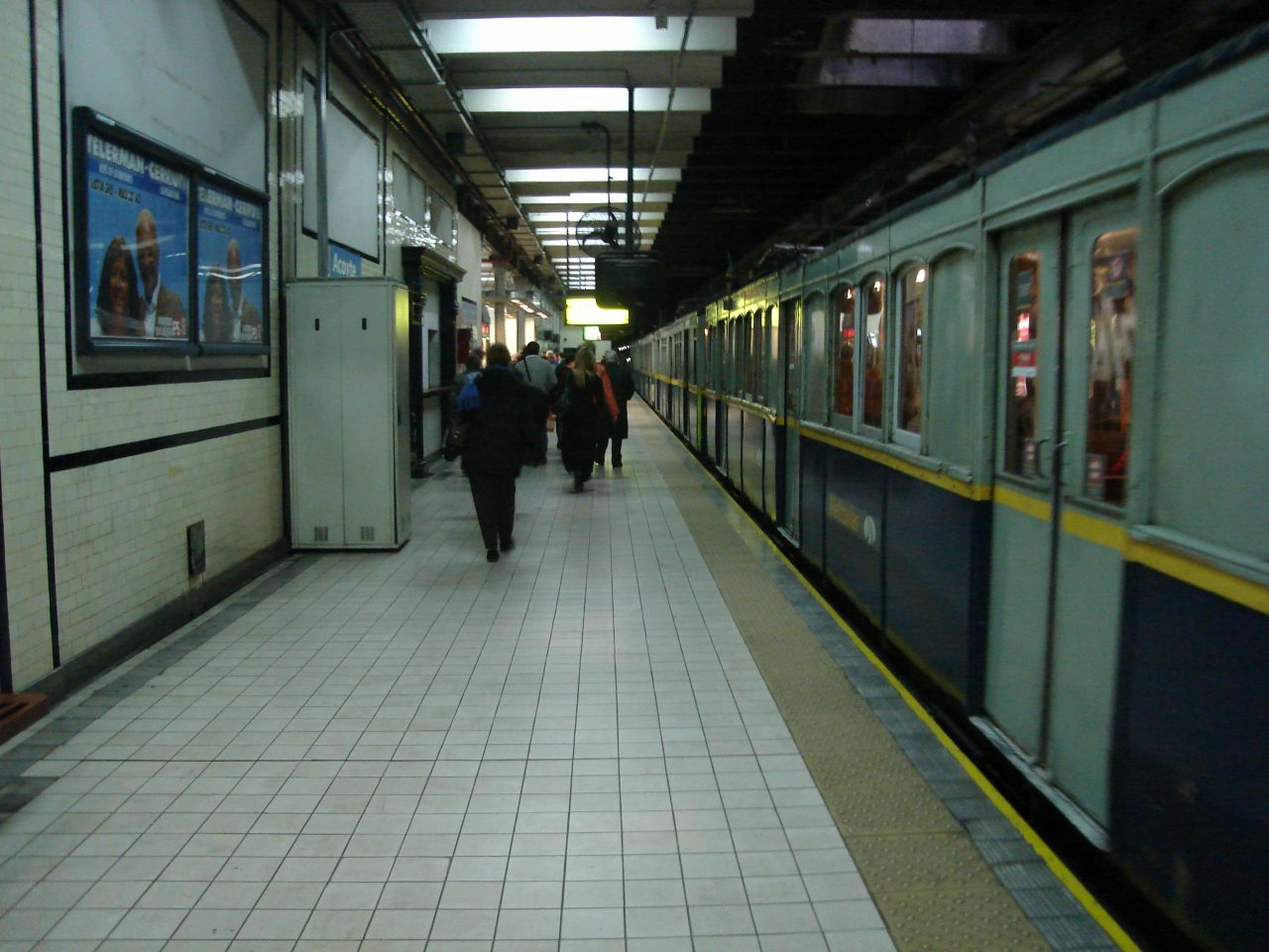 Vista del andén a Primera Junta de la estación Acoyte de la línea A de subterráneos porteña.